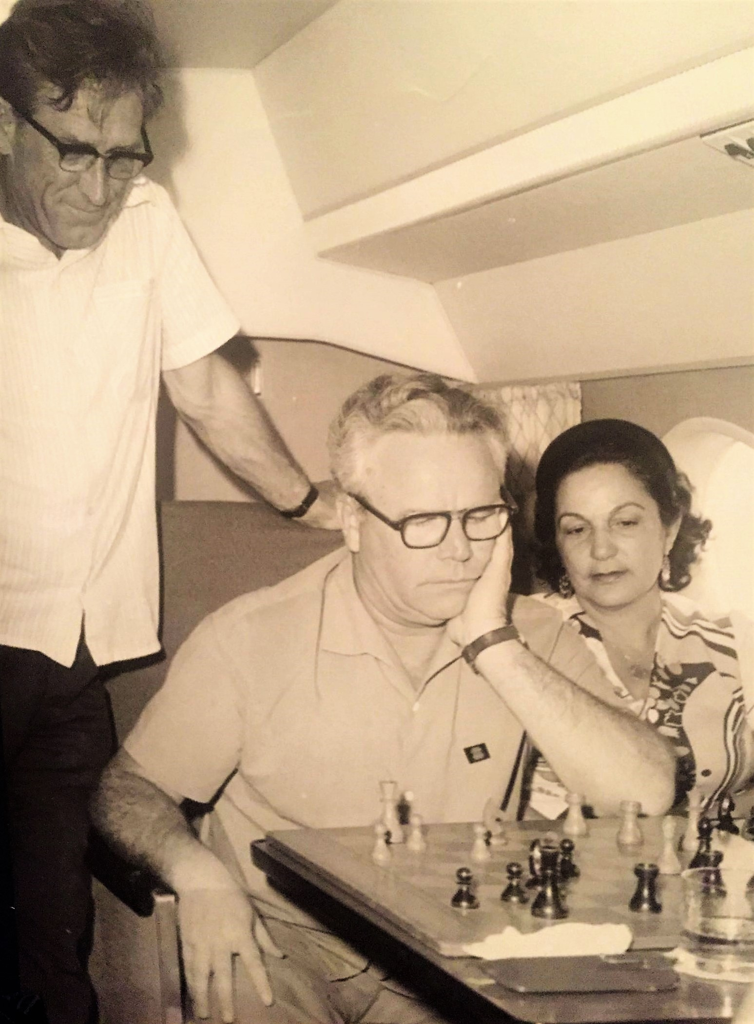 Николай Фёдорович Шестопалов с супругой в самолёте, следующем на Кубу. Шестопалов любил шахматы, был кандидатом в мастера спорта, мог играть одновременно с 10–12 партнёрами, участвовал в различных турнирах